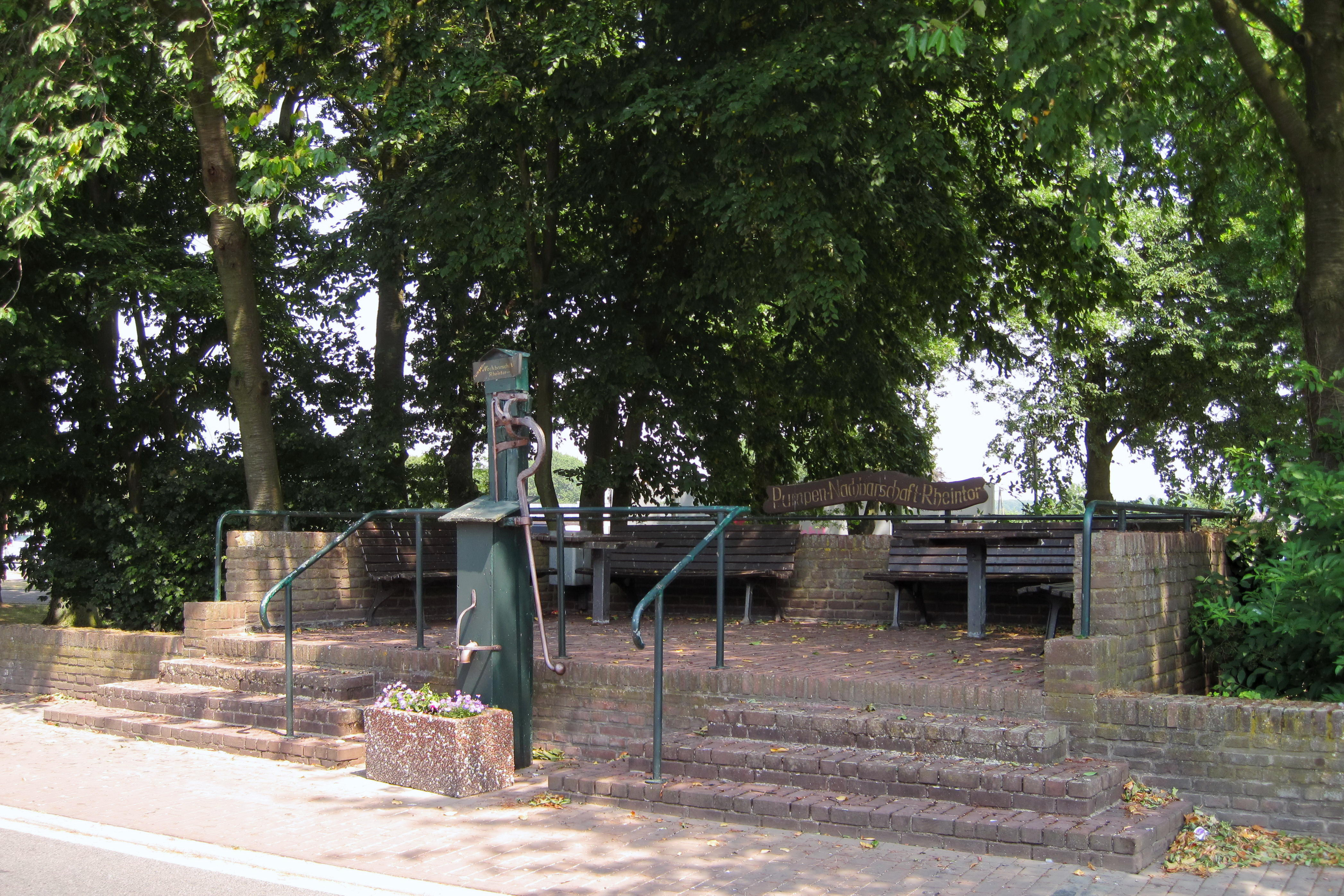 Rheintorpumpe der Pumpen-Nachbarschaft Rheintor in Xanten, Ostwall.